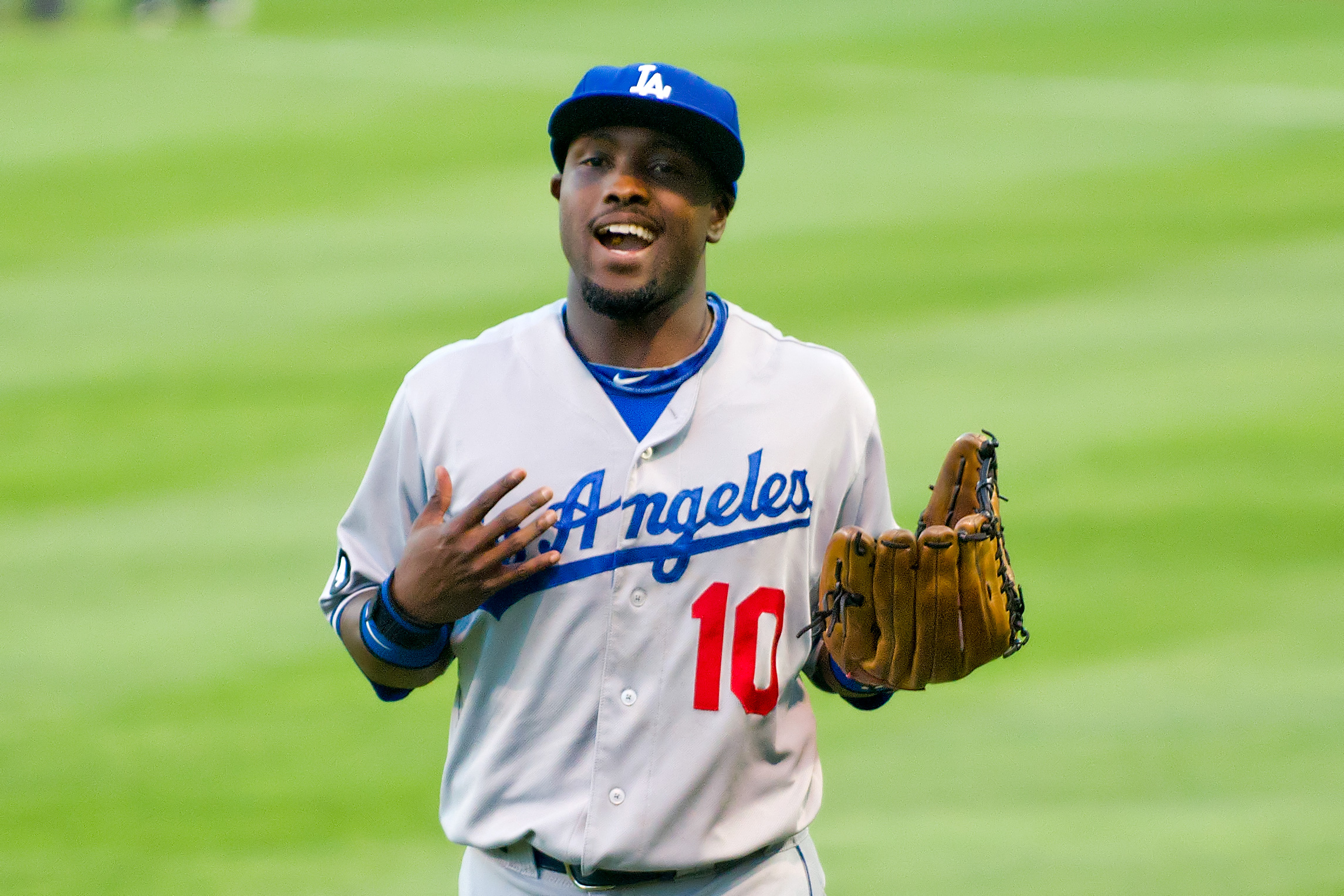 Tony Gwynn, Jr.